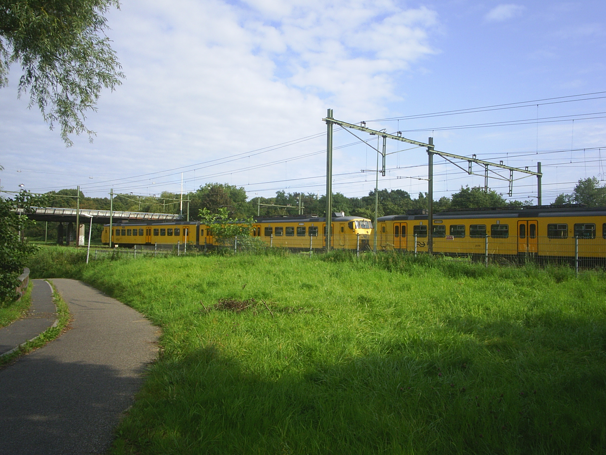 Pendeltrein naar spoorwegmuseum